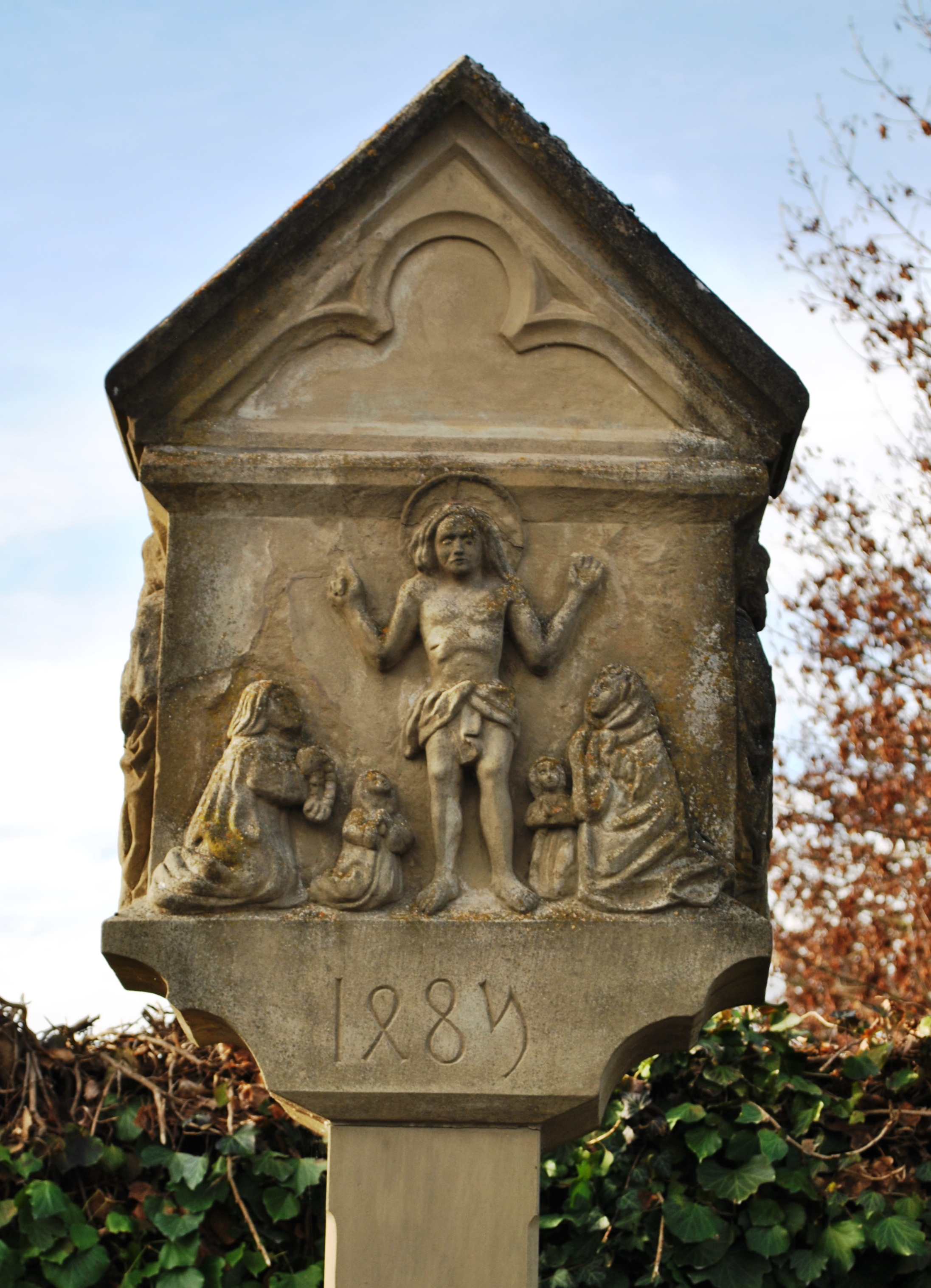 Bildstock von 1485, Volkach, restauriert